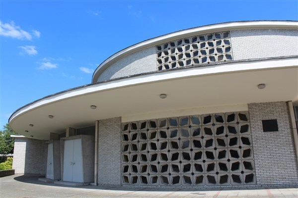 De inkompartij toont duidelijk de gebogen vorm van de kerk. We kijken hier recht op de 'glas-in-beton'-constructie van kunstenaar Maurits neven. Links op de foto zien we toegangsdeuren in een betonnen kubussen.